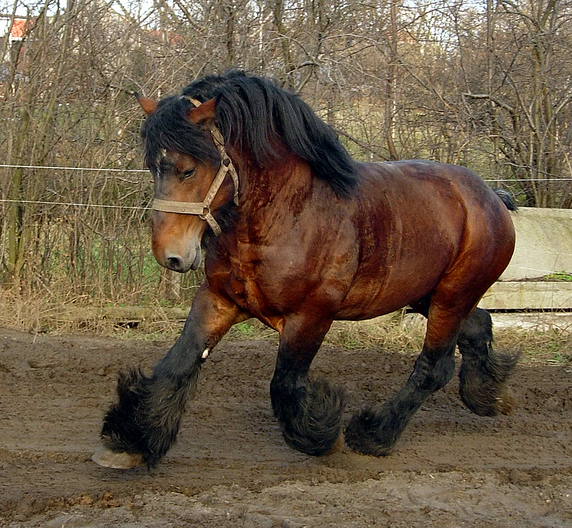 Ogier belgijski "Karel van Gaasbeek" w kłusie